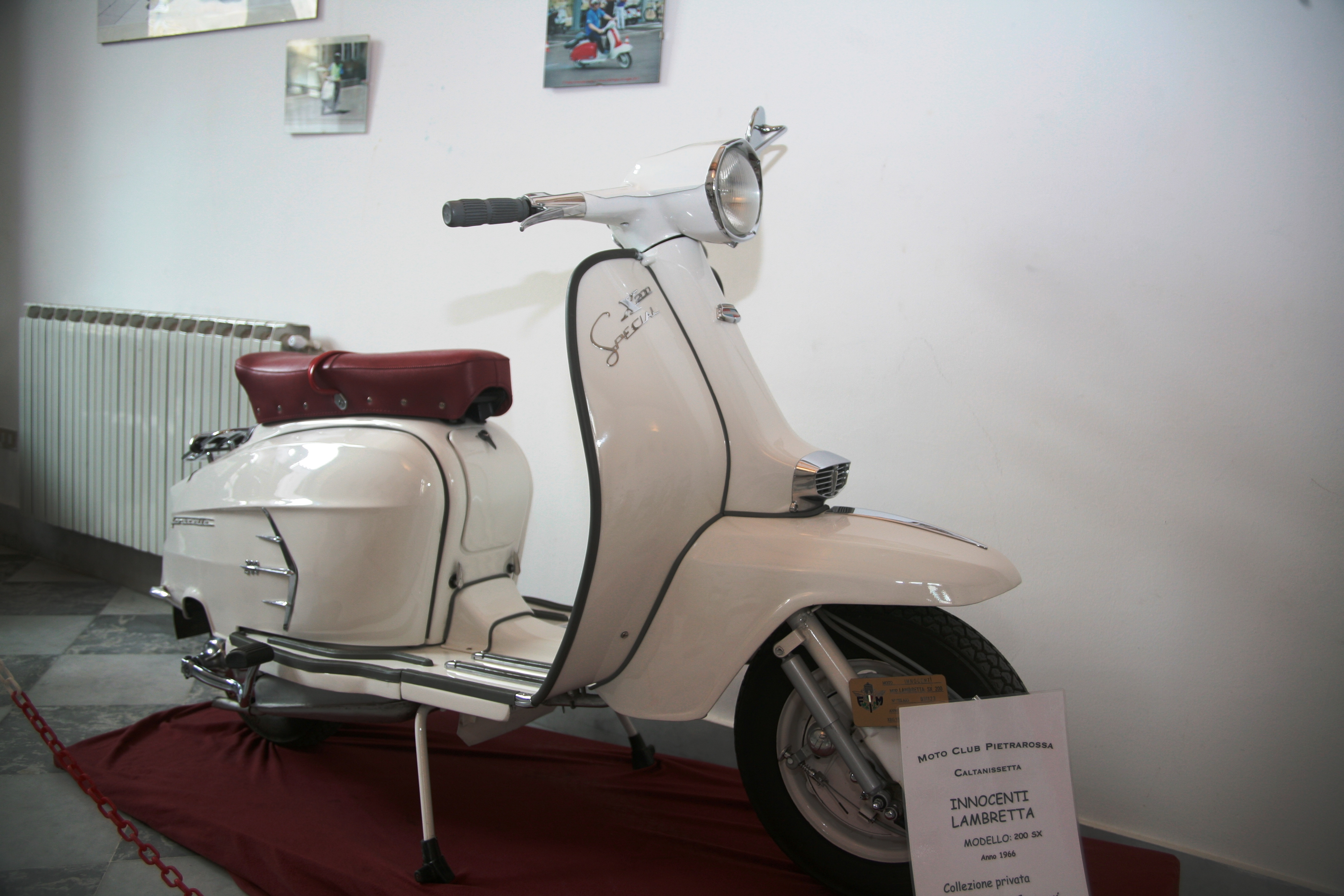 Innocenti Lambretta Mod. X 200 Speciale esposta c/o Palazzo del Carmine a Caltanissetta il 24-30 settembre 2014 in occasione della VII Mostra statica di Lambrette d'epoca.